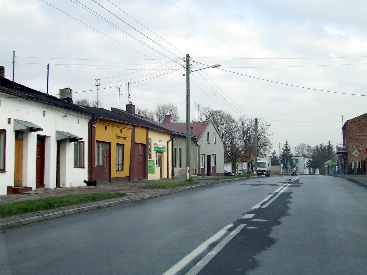 Nowa Brzeźnica, woj. łódzkie, główna ulica, droga krajowa Radomsko-Kluczbork